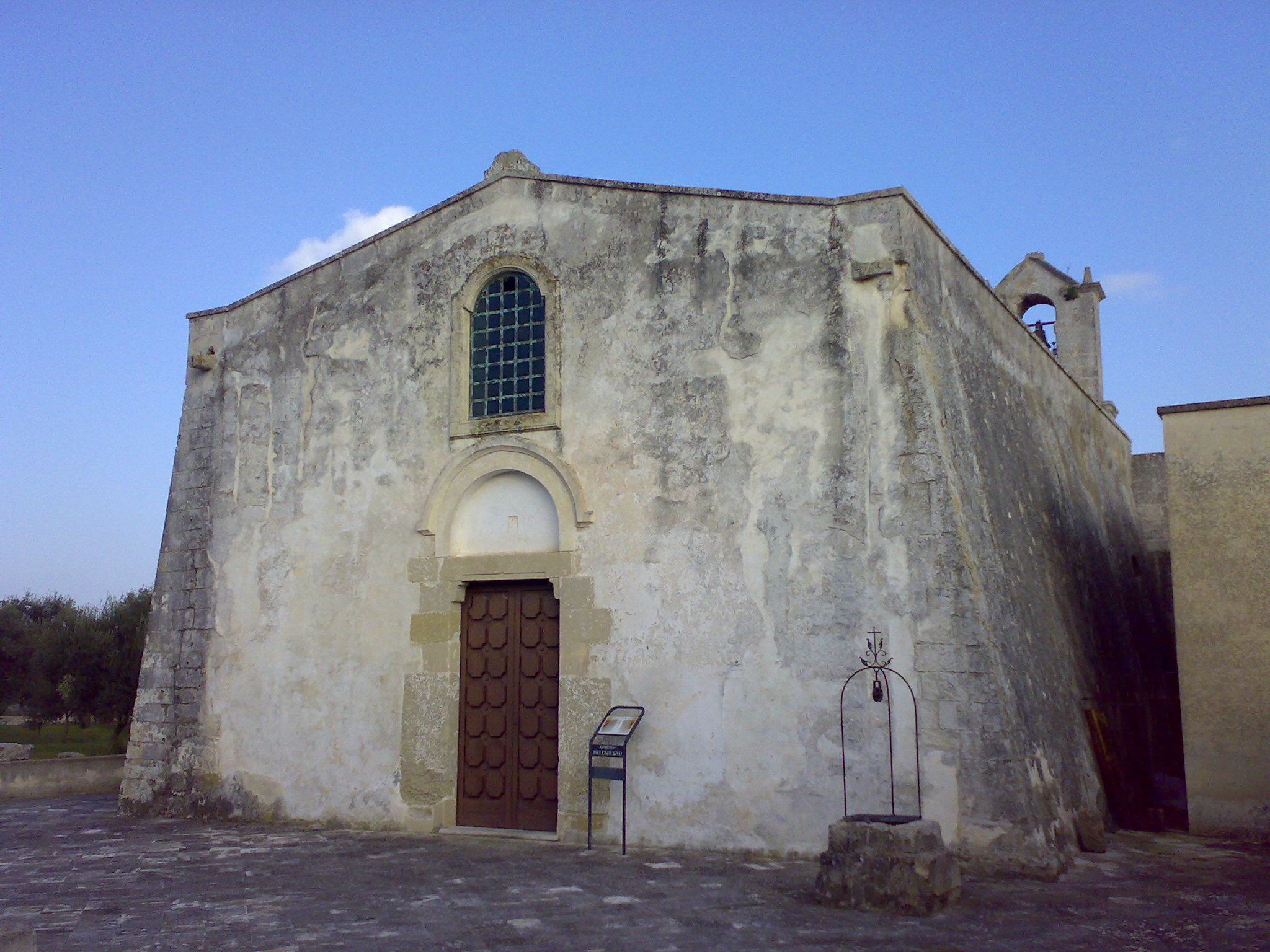 Abbazia di San Niceta a Melendugno